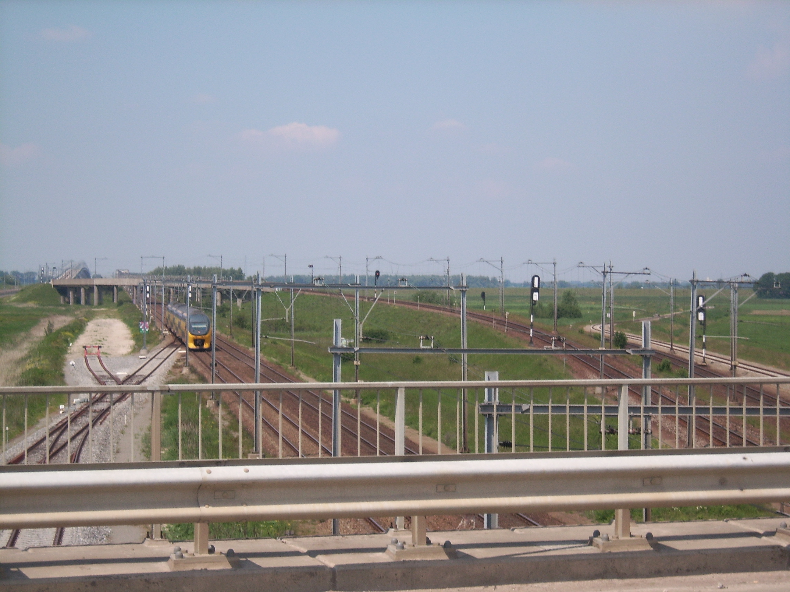 Spoorwegen in de omgeving van station Lage Zwaluwe